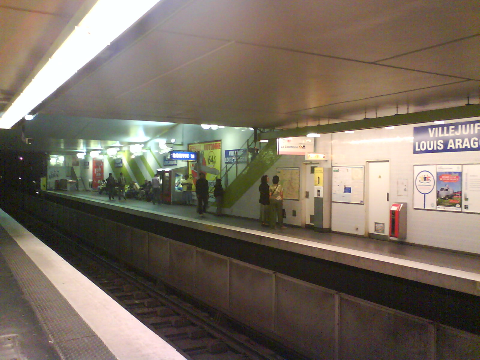 Station de métro Louis Aragon. Photo personnelle.